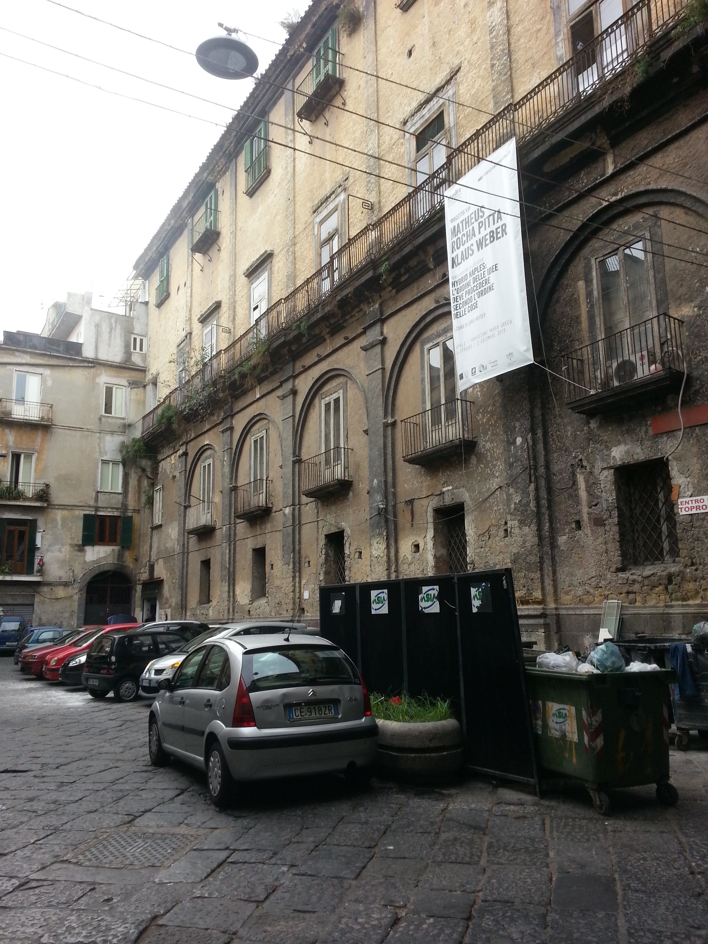 Largo Avellino, scorcio verso destra